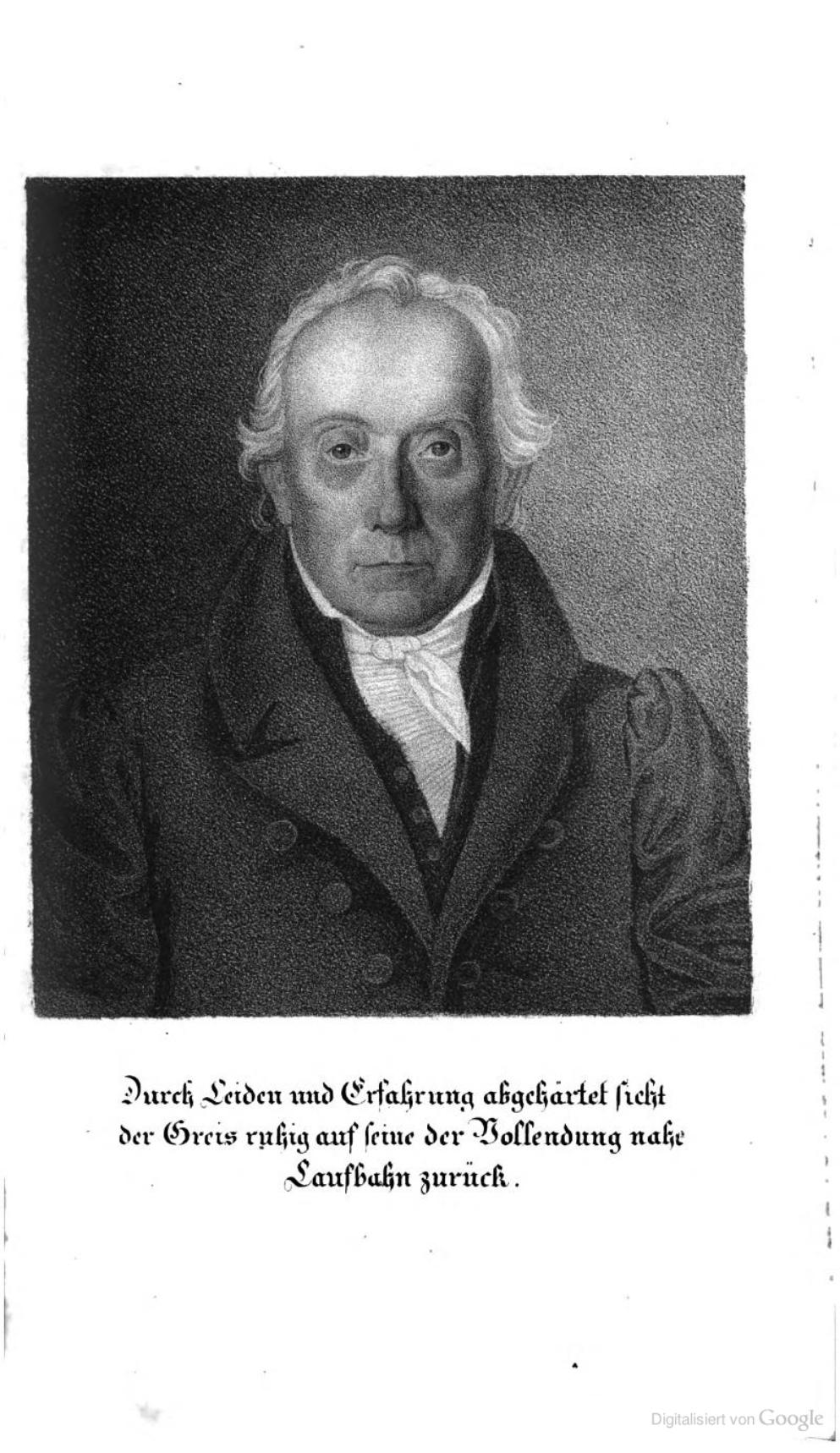 Johann Caspar Pfenninger (* 23. September 1760 in Stäfa; † 1. Februar 1838 ebenda) war ein Schweizer Arzt, Freiheitskämpfer, Staatsmann und Politiker